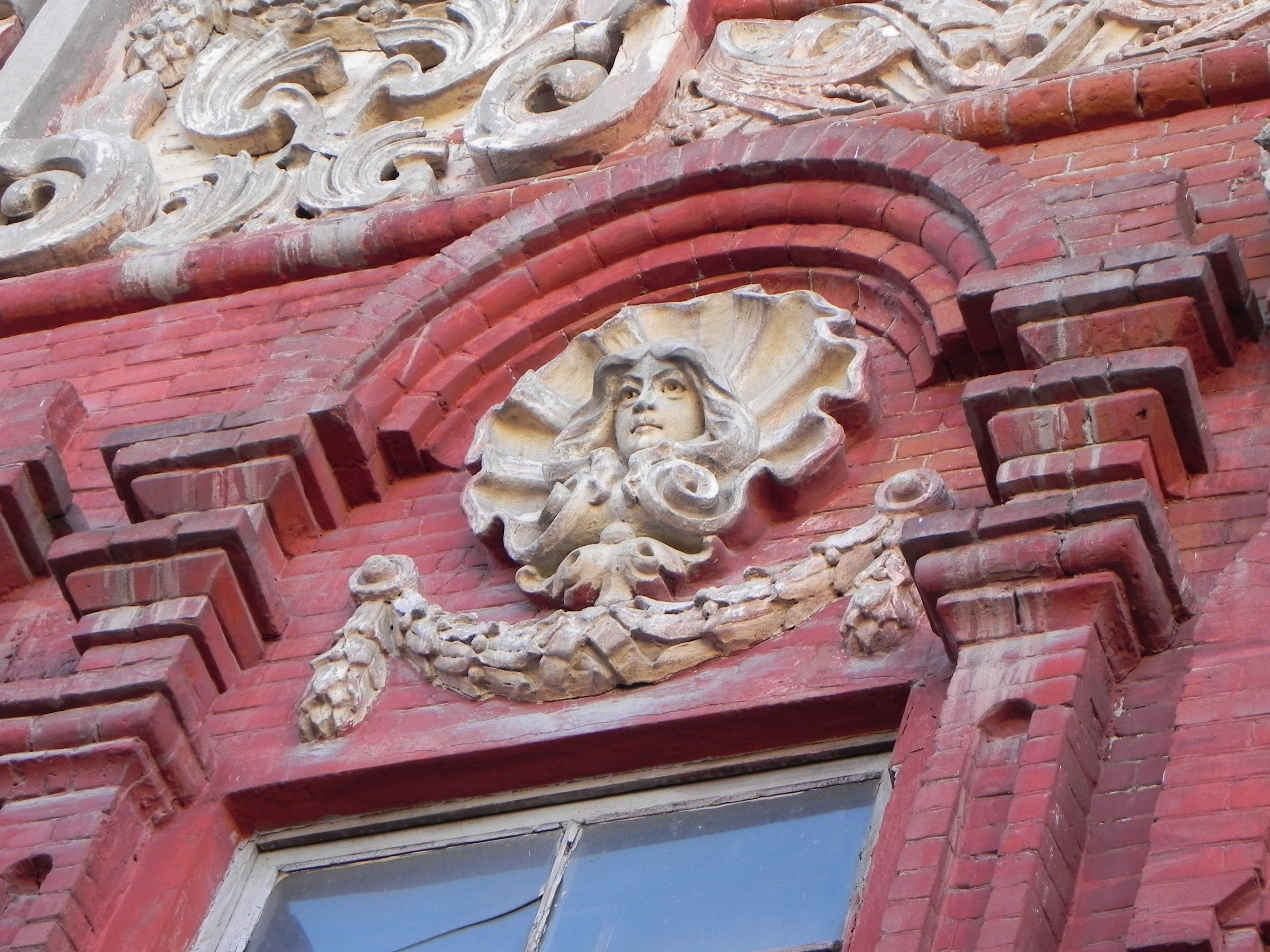 Гимназия женская № 4 (Волгоградская область, Волгоград, Академическая улица, 3)